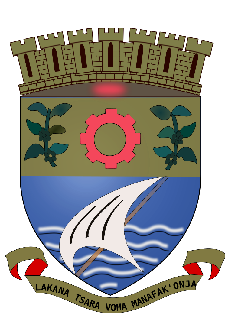 Blason de Toamasina